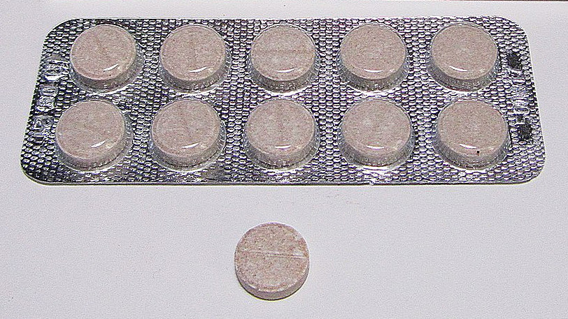 Таблетки ЦИТРАМОН П